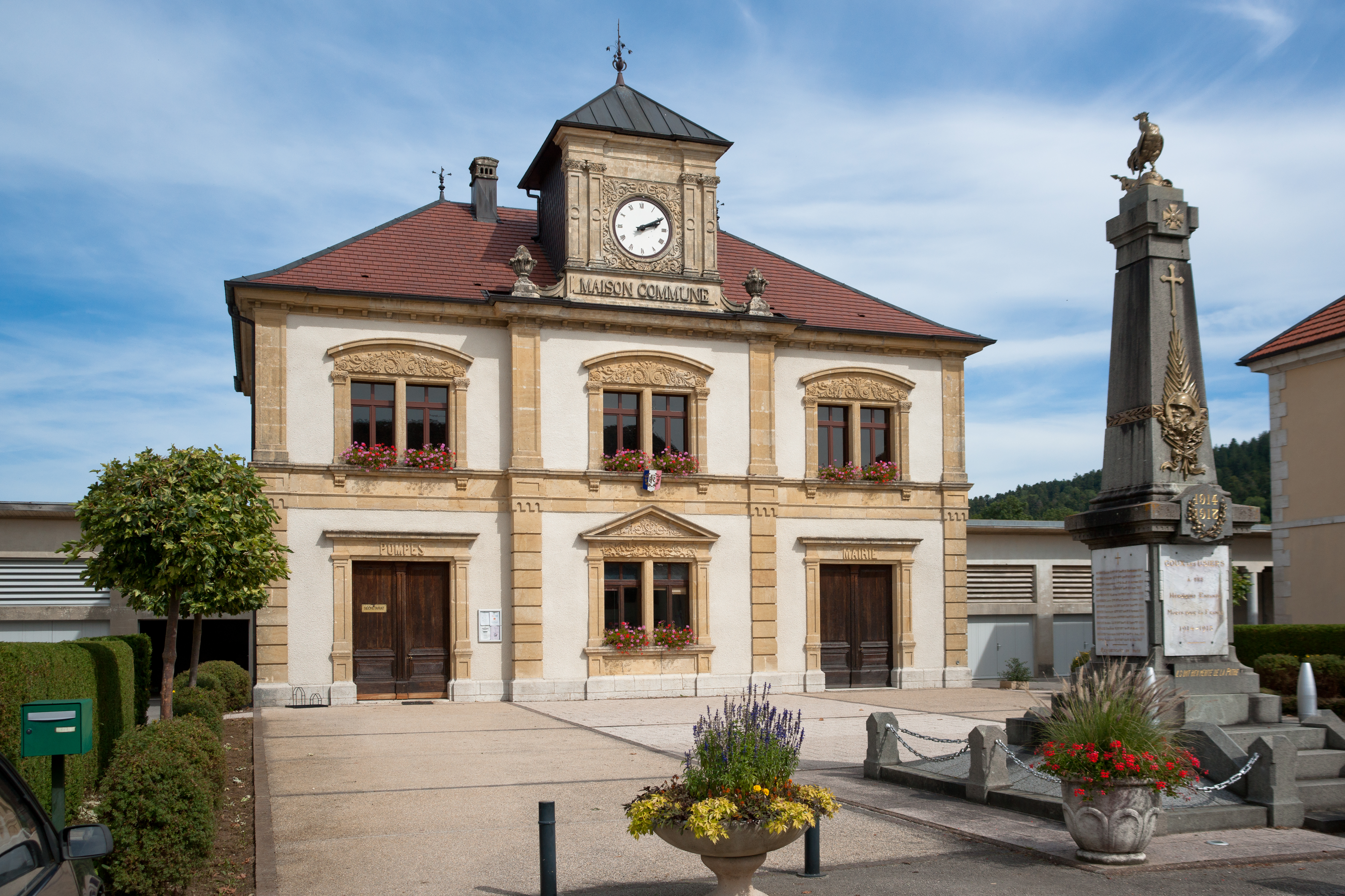 Maison de Commune de Goux-les-Usiers .